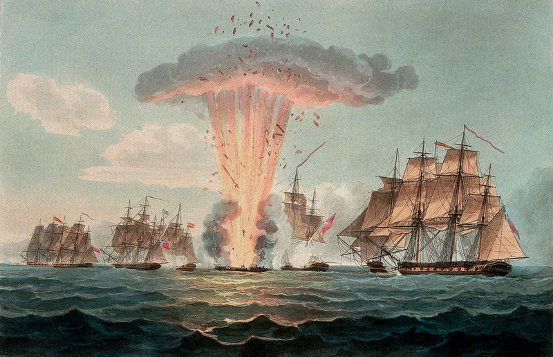 Batalla del Cabo de Santa María